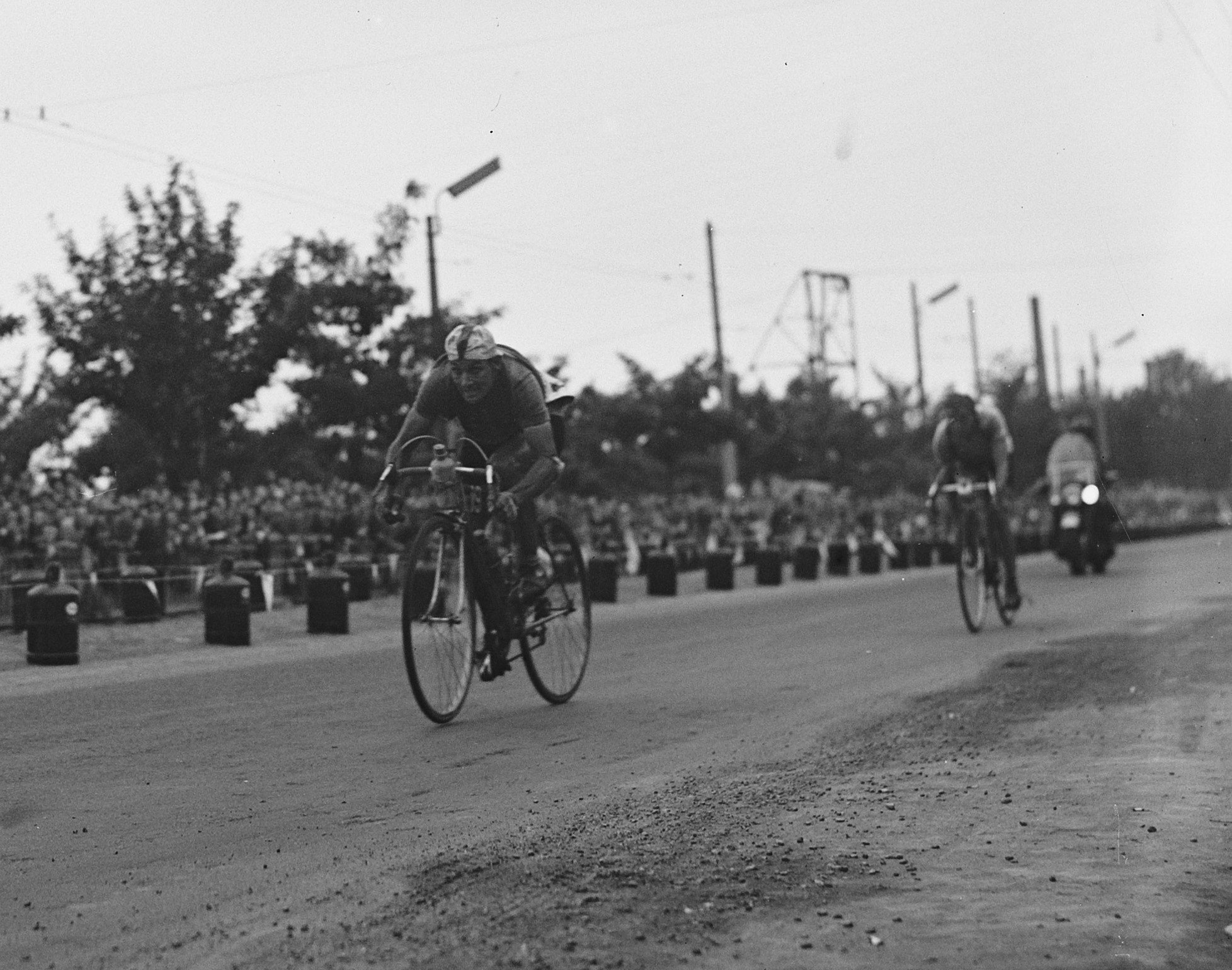 Tour de France. Zw. Schaer 1 Wagtmans 2.